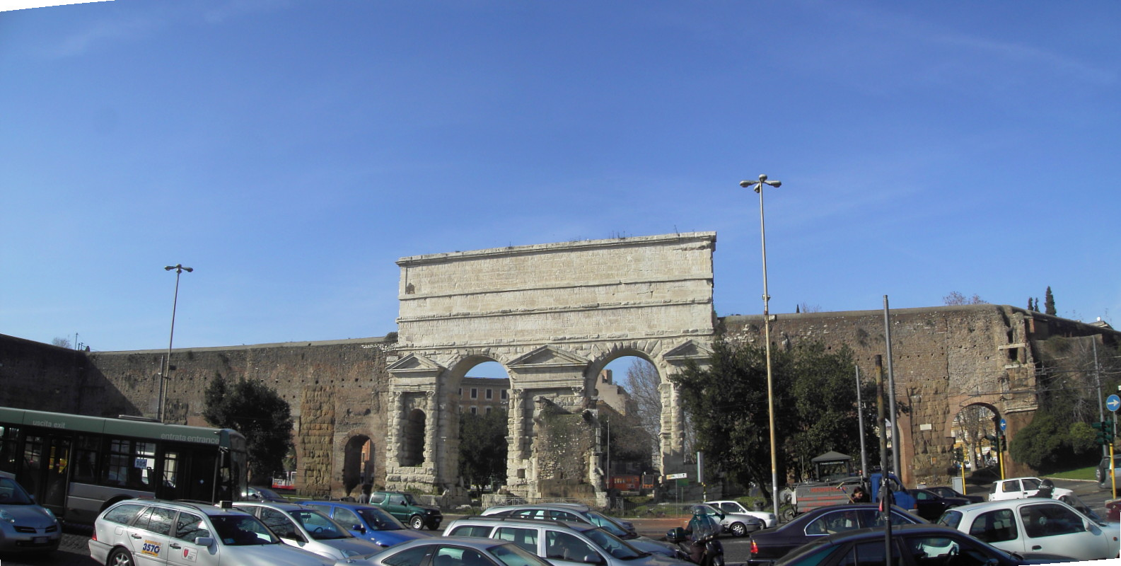 Roma, Porta maggiore e le mura